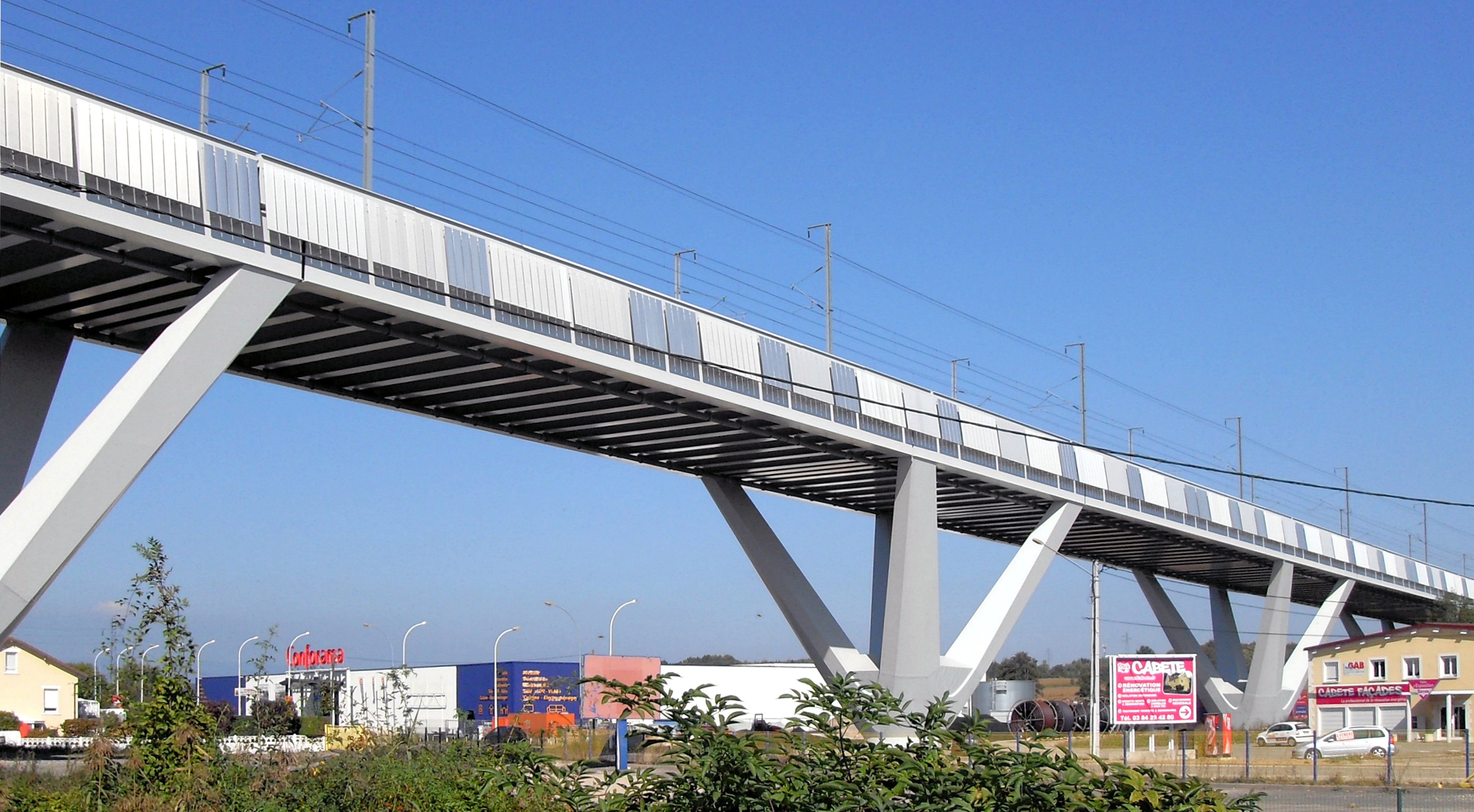 Le viaduc de la Savoureuse par la LGV Rhin-Rhône. Il franchit l'autoroute A36, le canal de la Haute-Saône ainsi que la Savoureuse à Trévenans.